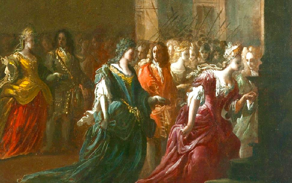 Pintura de Isabel de Farnesio. Reina consorte de España entrando al Palacio Boveri el 23 de septiembre de 1714 ubicado en Italia, Parma Borgotaro. Su llegada corresponde a la celebración de su matrimonio con el Rey de España Felipe VLa obra se encuentra en el Palacio Real de Caserta